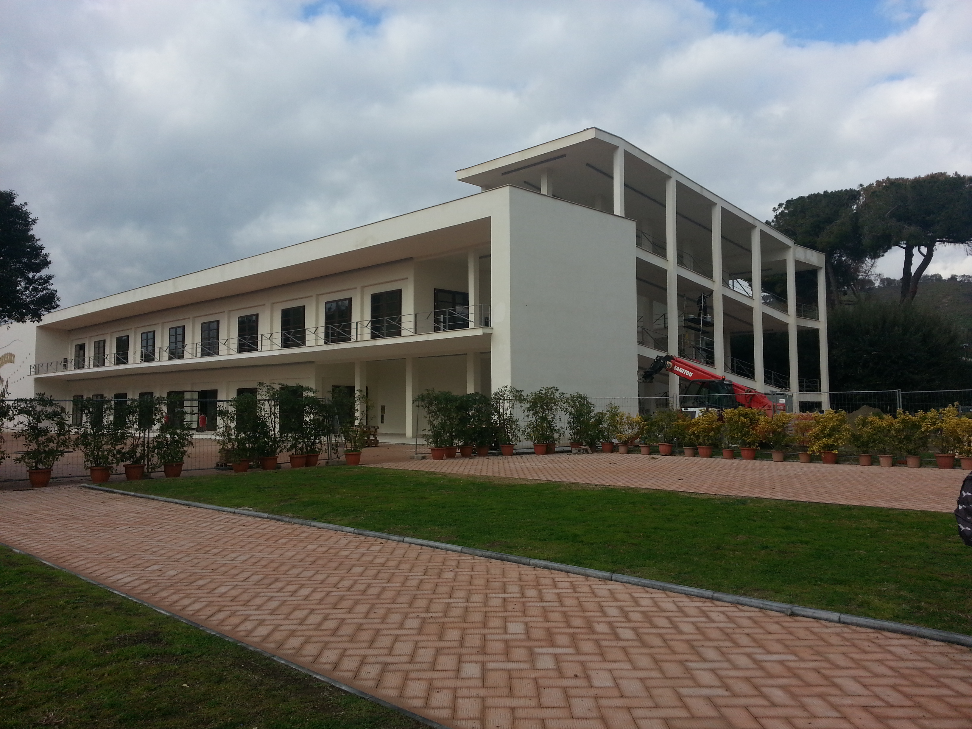 Il ristorante con piscina